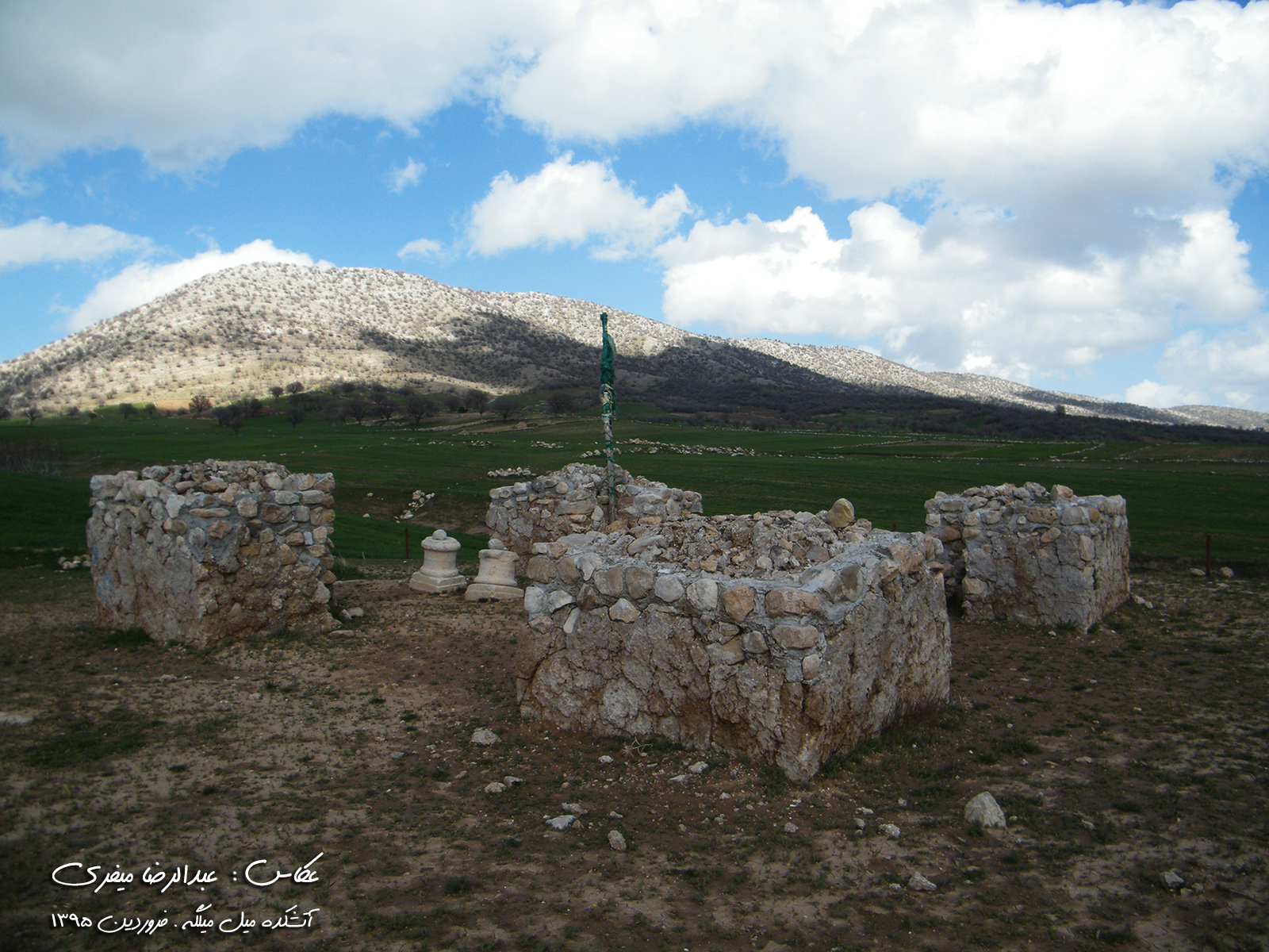 آتشکده میل میلگه